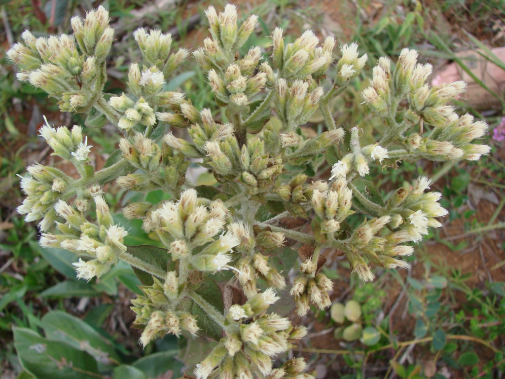 Mikania sessilifolia - ASTERACEAE - Chapada Imperial - Brasília - Distrito Federal - Brasil.